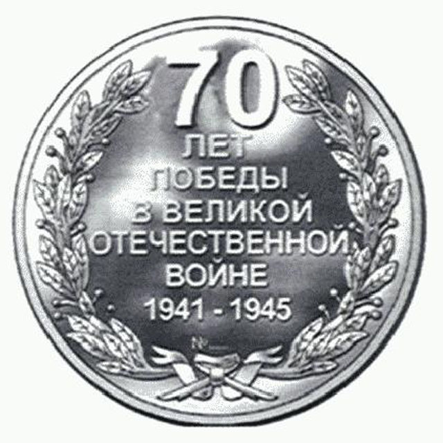 Юбилейная медаль «70 лет Победы в Великой Отечественной войне 1941—1945 гг.»